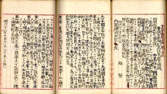 1895年11月18日(19日公布)